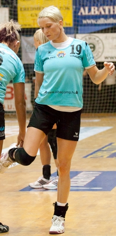 Rádl Tímea (balra) és Vincze Melinda (jobbra) kézilabdázók.